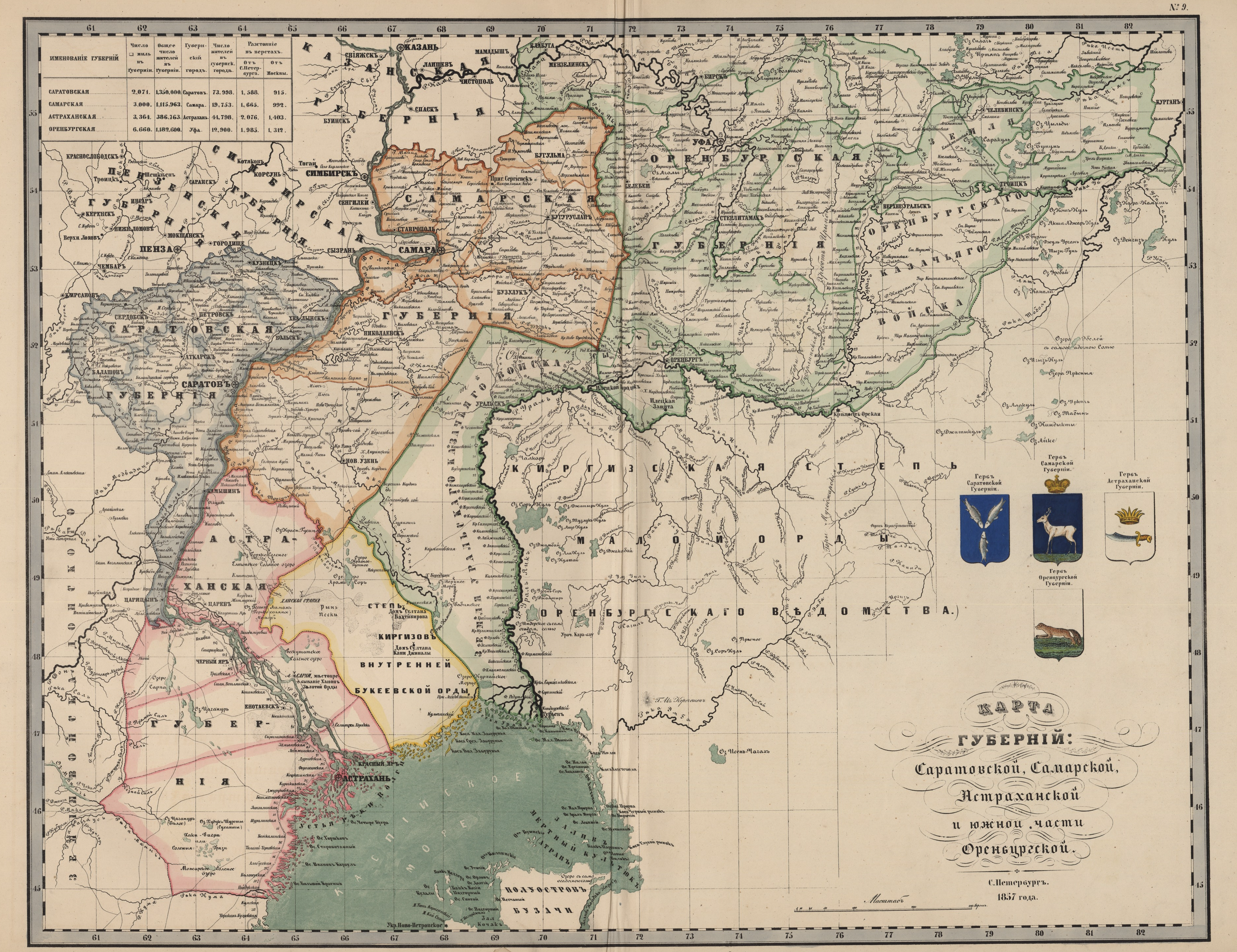 Карта Саратовской, Астаханской и юга Оренбургской губернии 1857 года. Редкий случай - на карье изображена Дубовско-Качалинская конно-железная дорога, существовавшая в 1846—1852 годах.